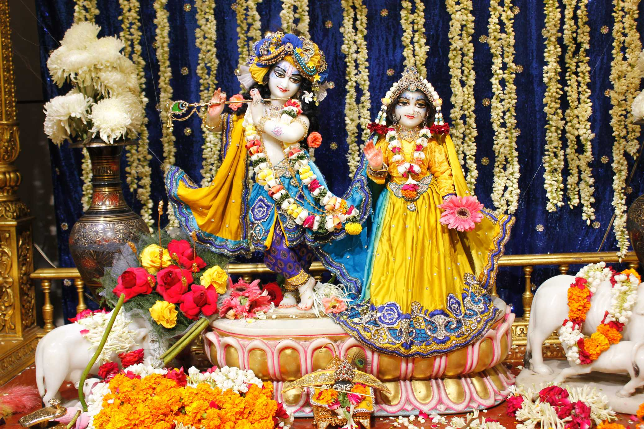 Vaishnavism Hindu deities